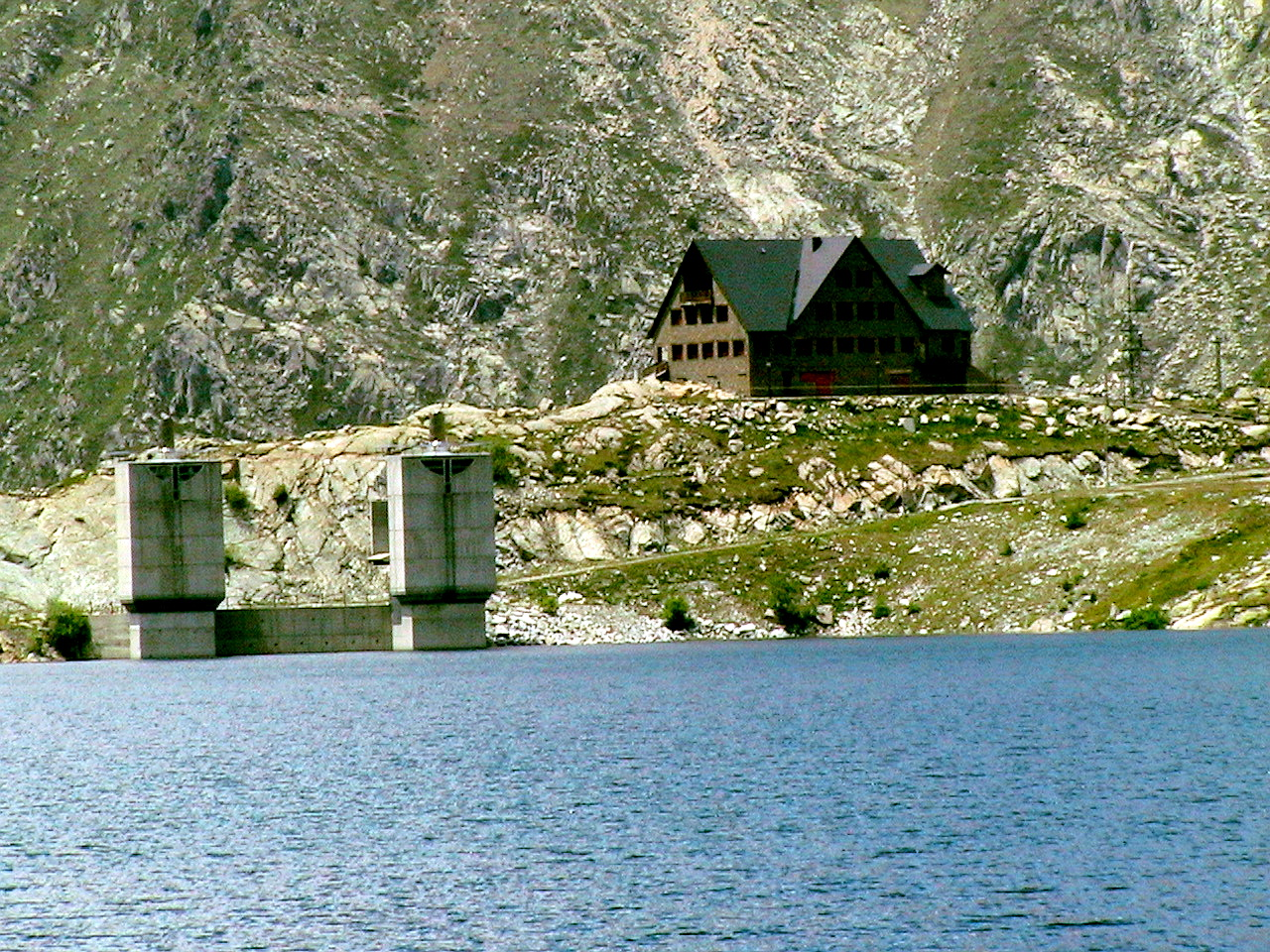 Torres de la central reversible Estany Gento-Sallente i alberg-refugi. La Torre de Cabdella (Pallars Jussà - Catalunya)